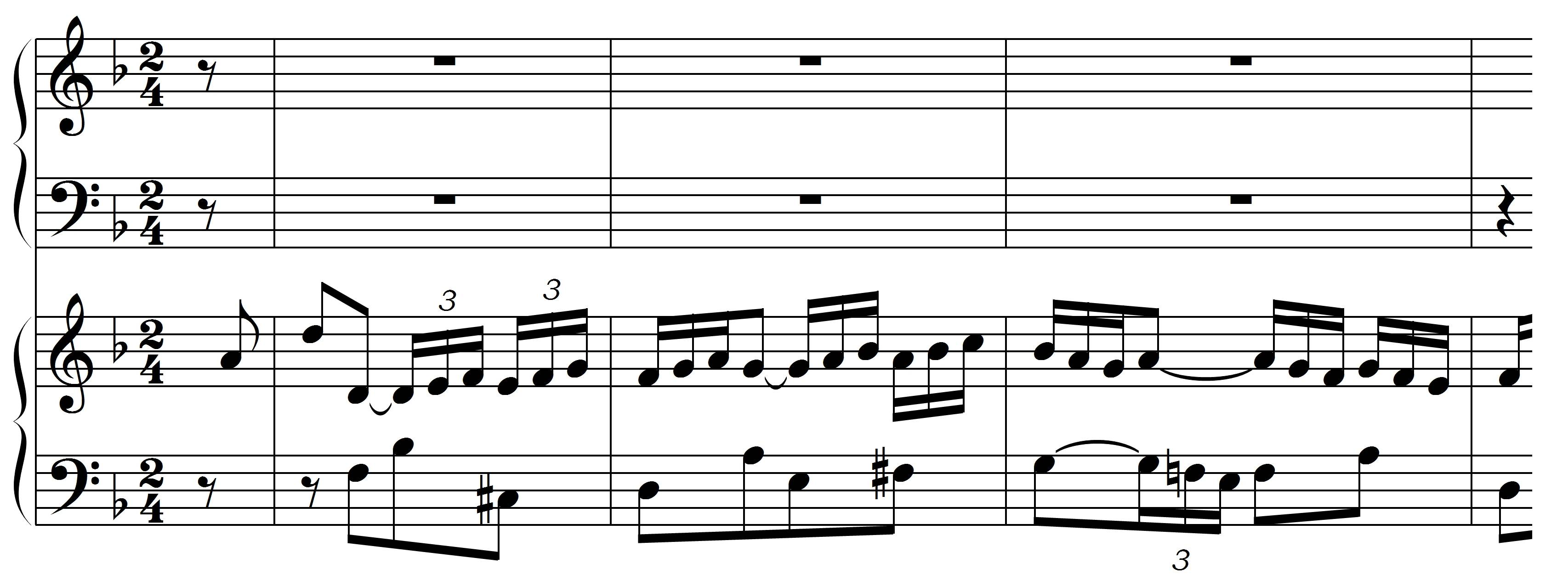 Bach, JS, Incipit Contrapunctus 18,1, BWV 1080